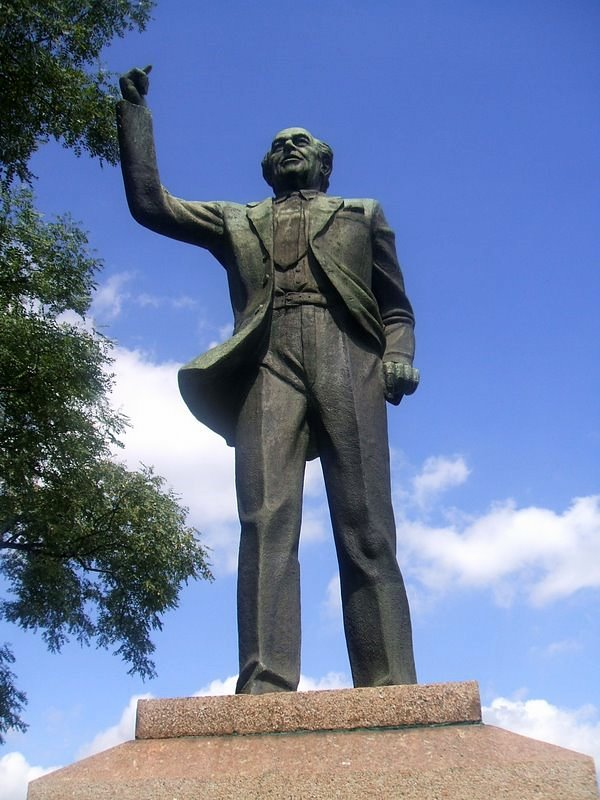 Luiz Morrone (1906-1998) - A Ibrahim Nobre - O Tribuno (O Povo Paulista). No Parque do Ibirapuera, em São Paulo, Brasil.